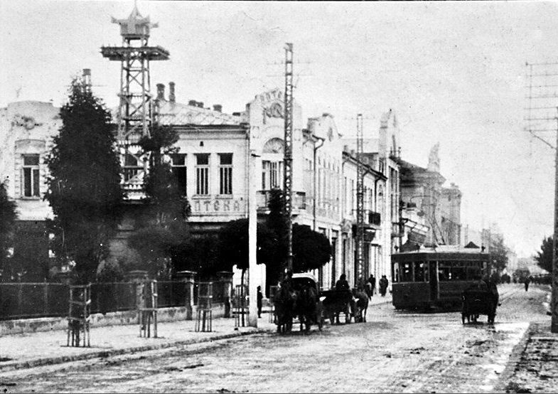 Третья линия «Бетлинговская» была открыта 29 августа 1914 года. Маршрут следовал по улицам Подгорной, Школьной, Лазаревской, переулок Фабра, улицам Пушкинской, Гоголевской, Марковской, Бетлинговской до Шестирековской слободки.